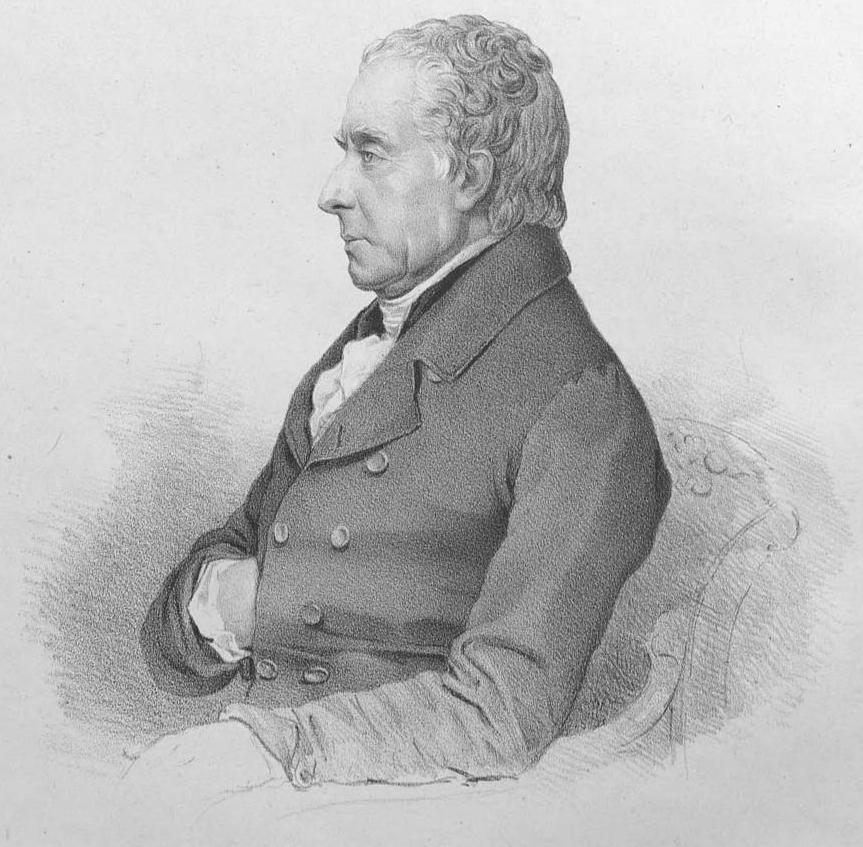 Бортнянский, Дмитрий Степанович